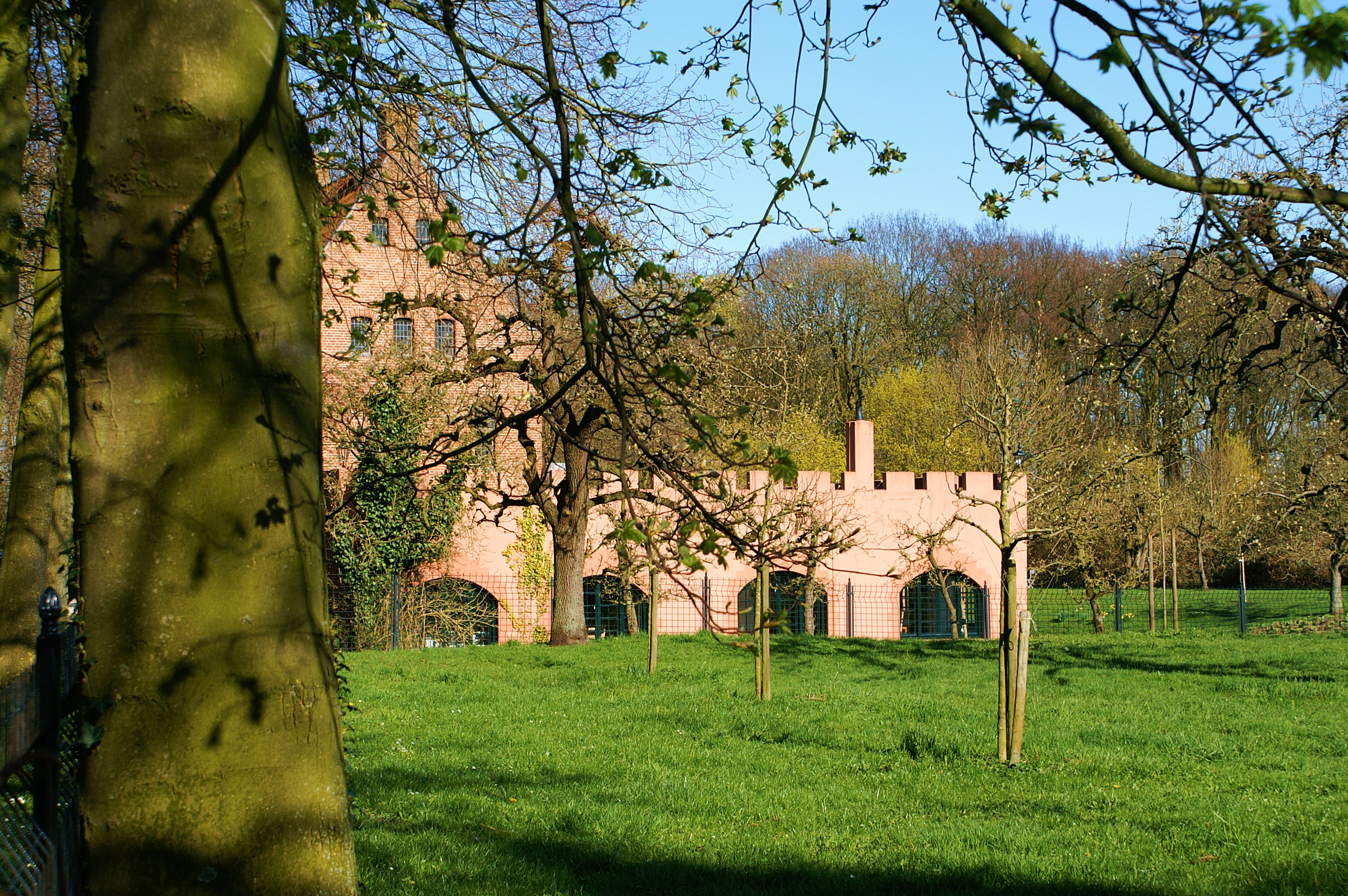 De kelders van het huis Harmelen te Harmelen.